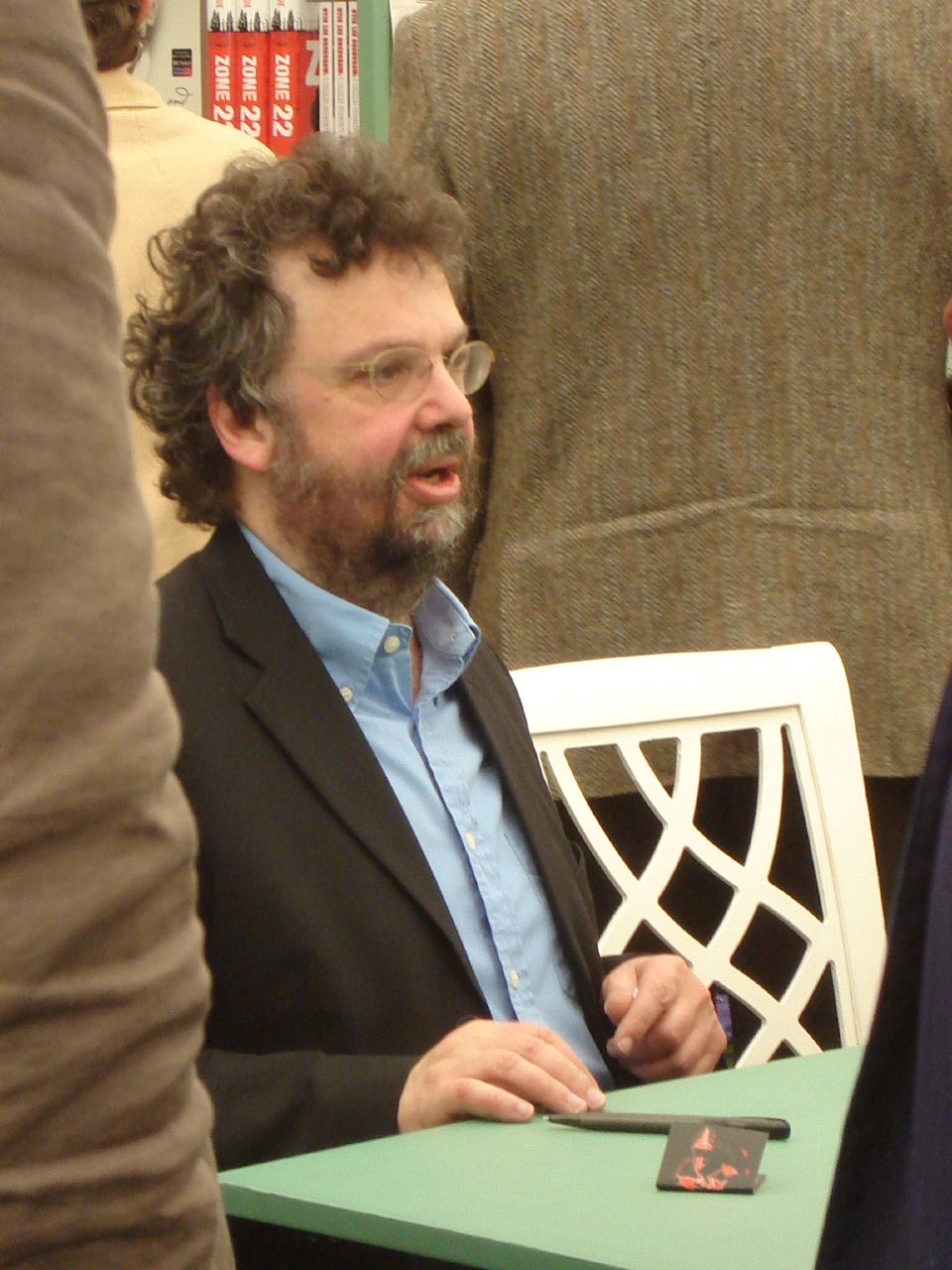 Book signing at Hay